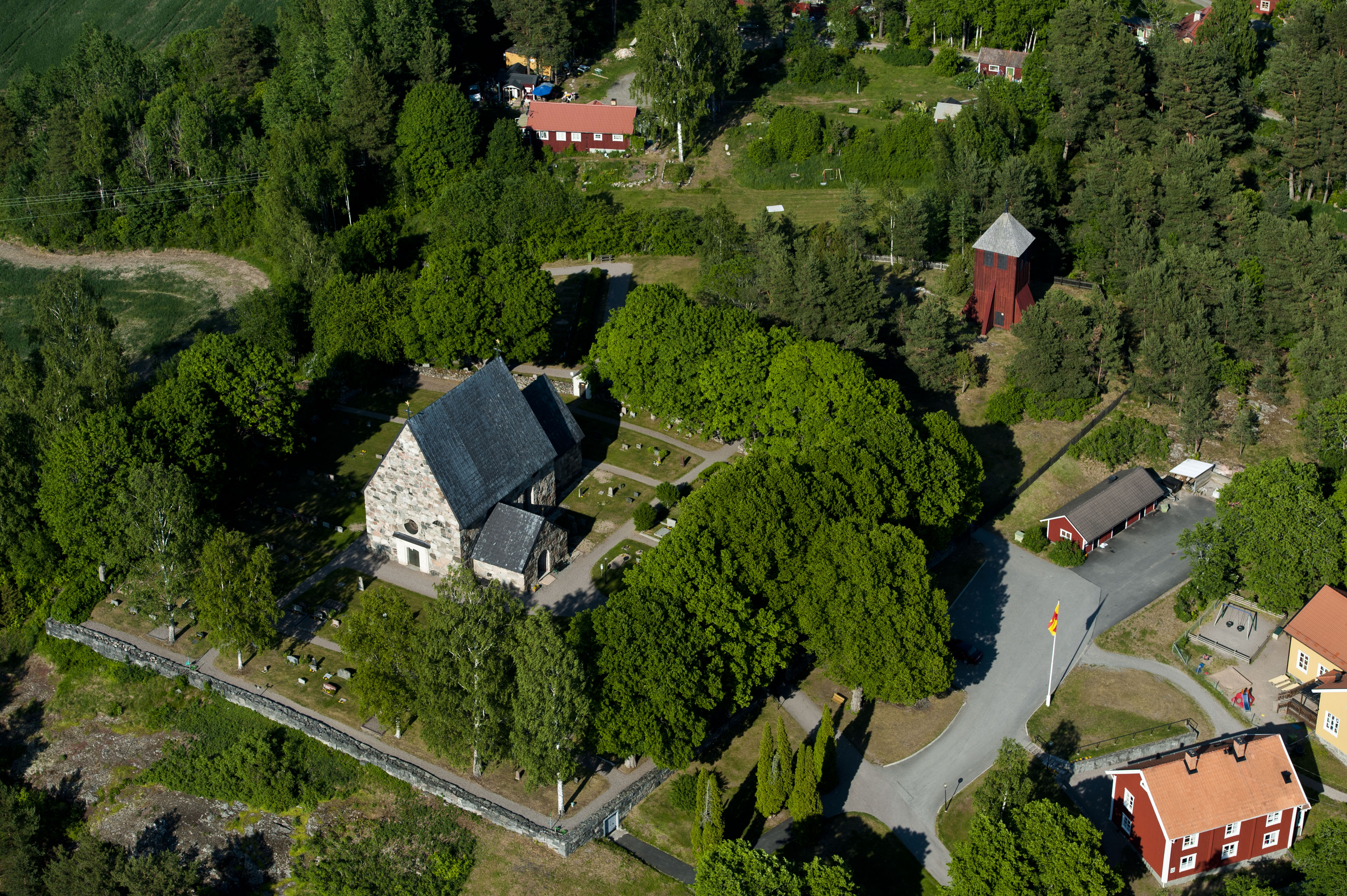 Össeby Garns ka